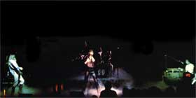 Faithful Breath "live on stage" im Jahre 1978 mit (v.l.n.r.) Heimi, Piet (kaum zu sehen), Jürgen Renfordt, Jürgen Weritz (hinter den Drums auf dem Podest) und Manfred von Buttlar